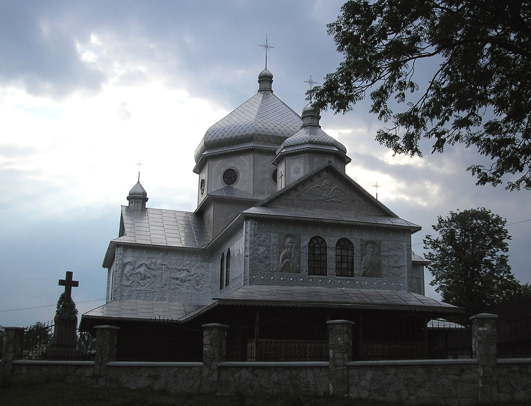 Троїцька церква в селі Космач, що на Гуцульщині